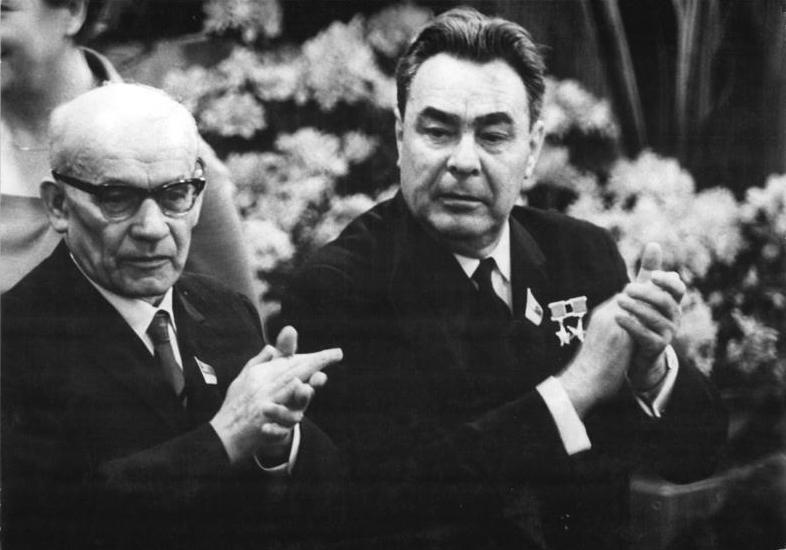 Zentralbild Kohls 17.4.67 VII. Parteitag der SED eröffnet (17.4.67). Der überall mit großem Interesse und Spannung erwartete VII. Parteitag der Sozialistischen Einheitspartei Deutschlands hat am Vormittag des 17.4.1967 seine Beratungen aufgenommen. Pünktlich um 10.00 Uhr erklärte Walter Ulbricht, Erster Sekretär des Zentralkomitees der SED, in der festlich geschmückten Berliner Werner-Seelenbinder-Halle vor den Delegierten und Gästen den Parteitag für eröffnet. UBz.: Der Generalsekretär des ZK der KPdSU, Leonid Breshnew (rechts), und der Erste Sekretär des ZK der PVAP, Wladyslaw Gomulka, - hier im Präsidium während der Eröffnung des Parteitages - werden begeistert von den Delegierten und Gästen begrüßt.